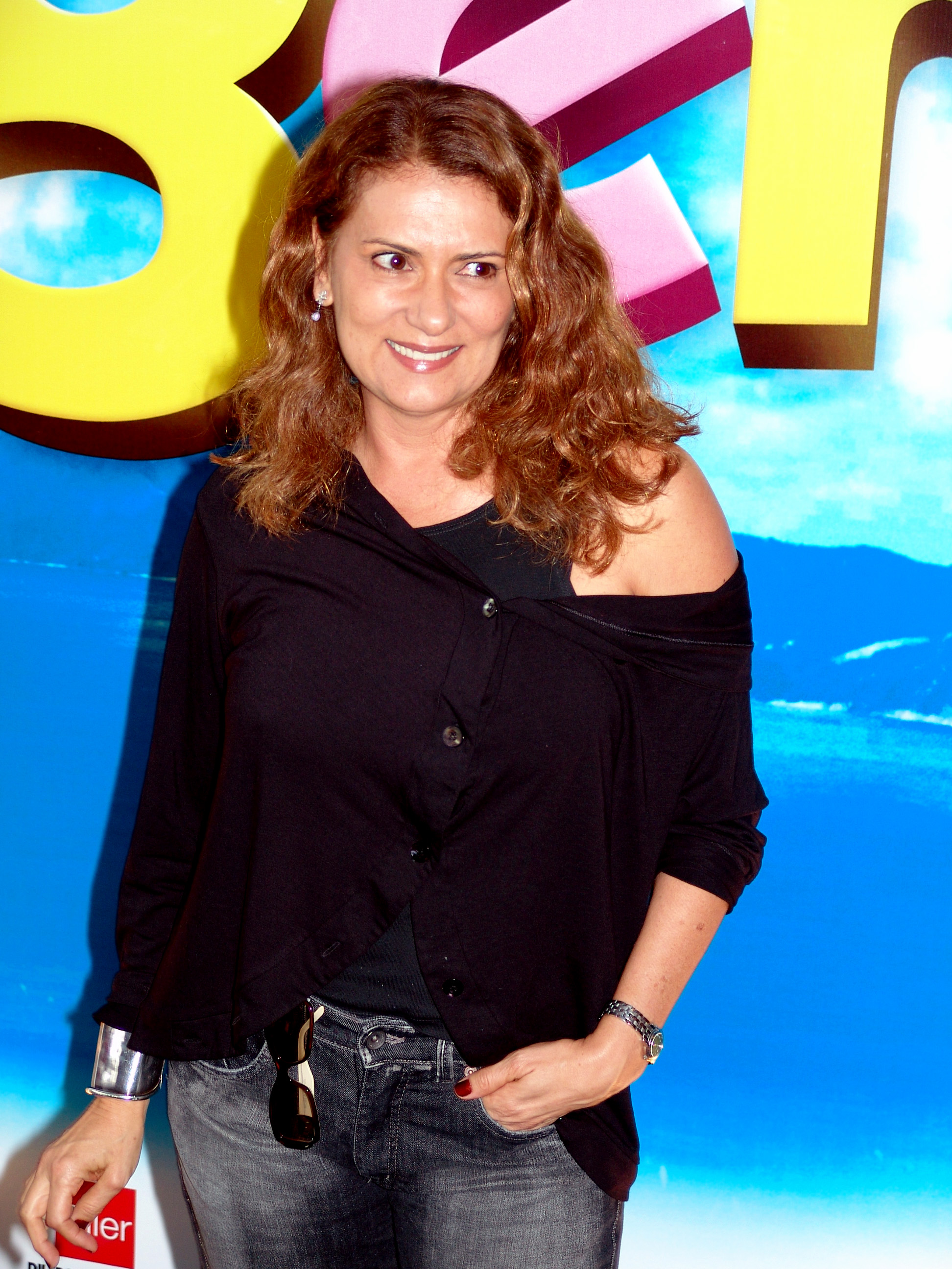 Actriz brasileira Patrícia Travassos